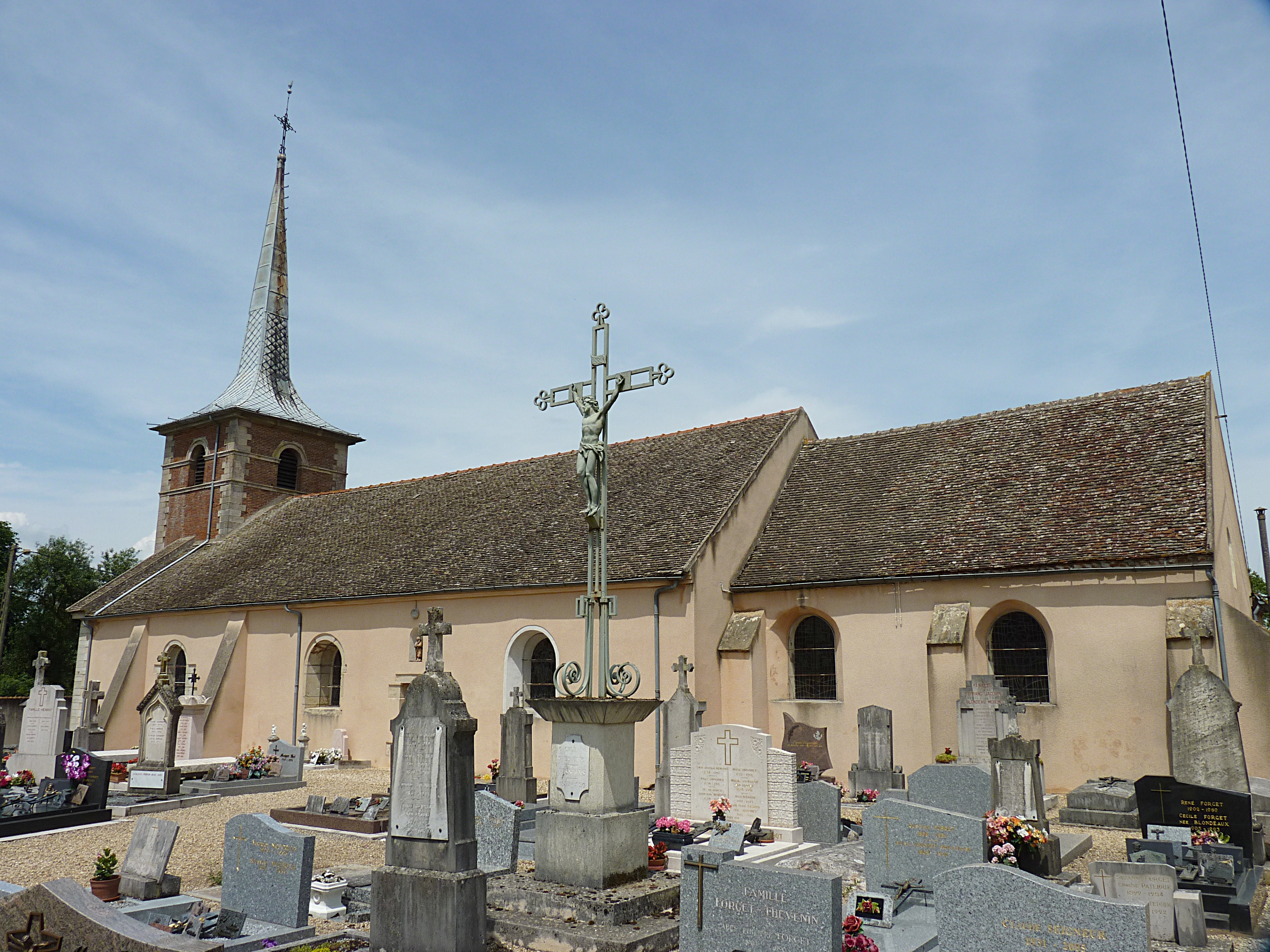 Église paroissiale de la Nativité de la Vierge, Chamblanc (Côte d'Or, Bourgogne, France)